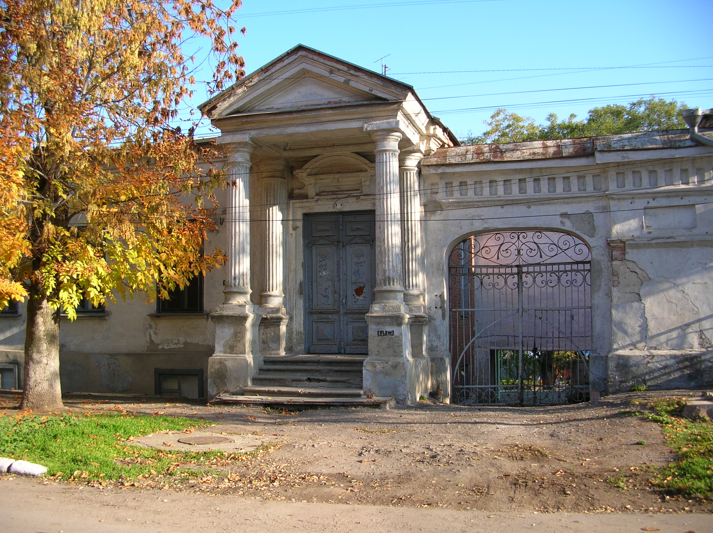 Жилой дом: улица Шмидта, 10, Таганрог, Ростовская область